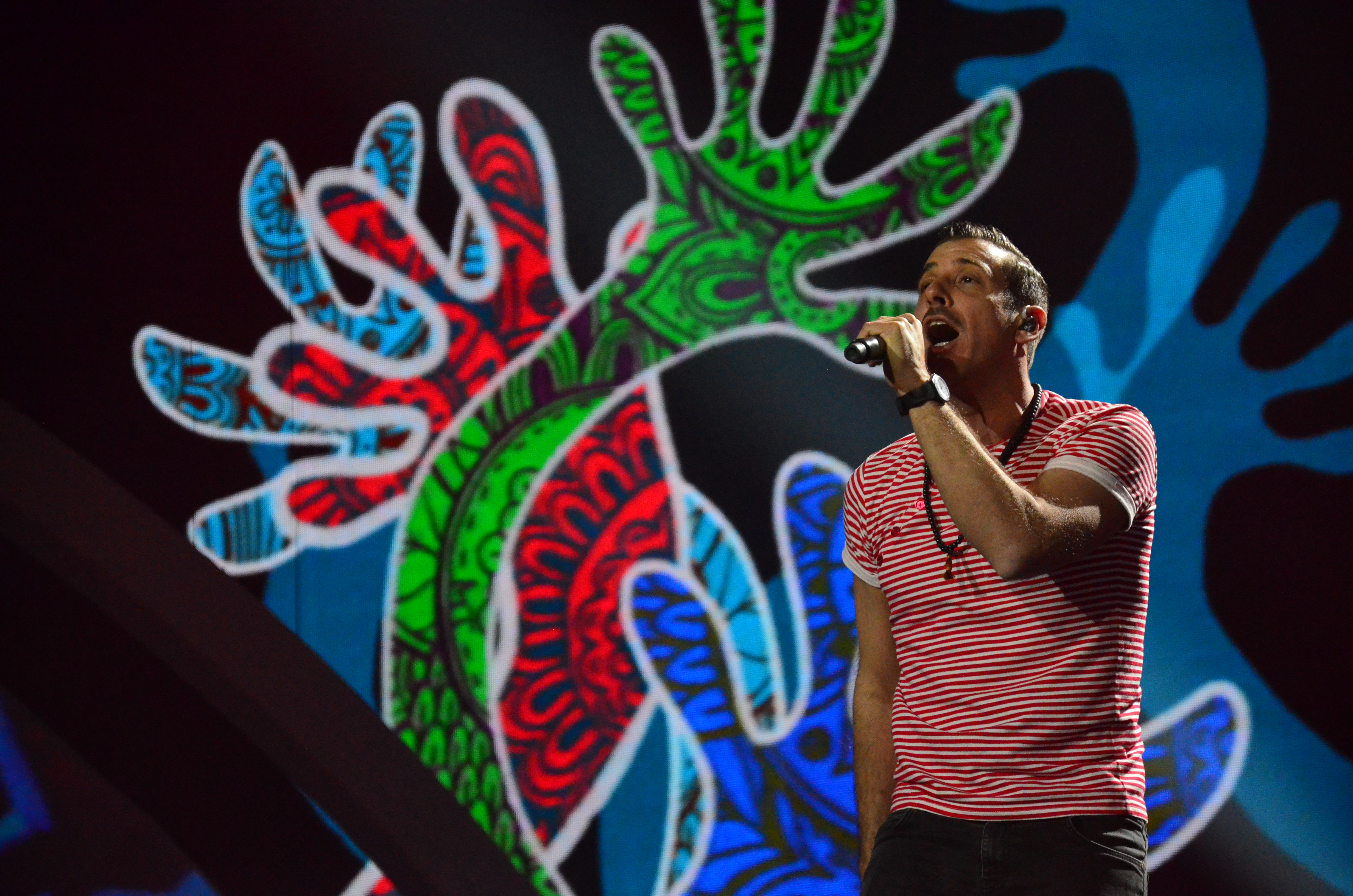 12 травня. Генеральна репетиція фіналу Євробачення 2017. Francesco Gabbani (Italy).